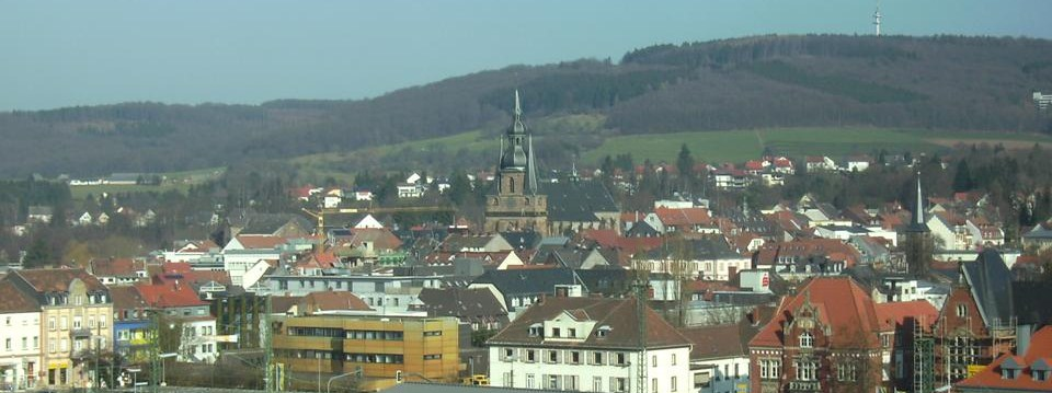 St. Wendel: Stadtbild (von Süden aufgenommen)